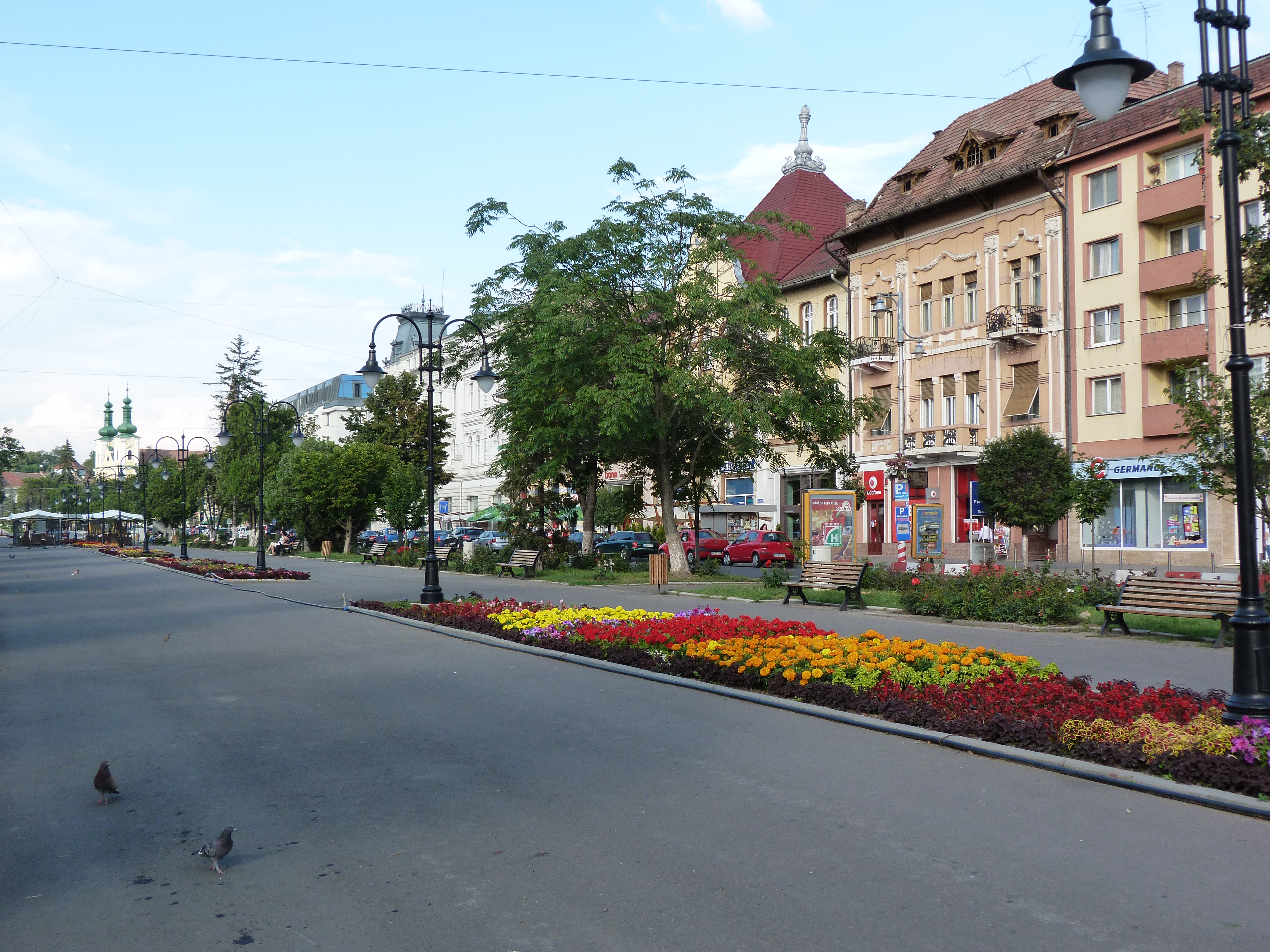 A felvétel 2013. július 11 -én csütörtökön készült Marosvásárhelyen. ©© Published under Creative Commons in the Metapolisz DVD line. All of the photos and vids in the Metapolisz DVD line are under Creative Commons and can be used even for commercial – for profit – purposes. Recommended Citation Derzsi Elekes Andor: Metapolisz DVD line